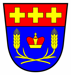 znak obce Uzenice